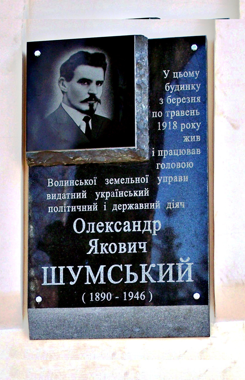 Мемориальная доска на доме в Житомире, в котором жил А. Я. Шумский. Украина. 2011.